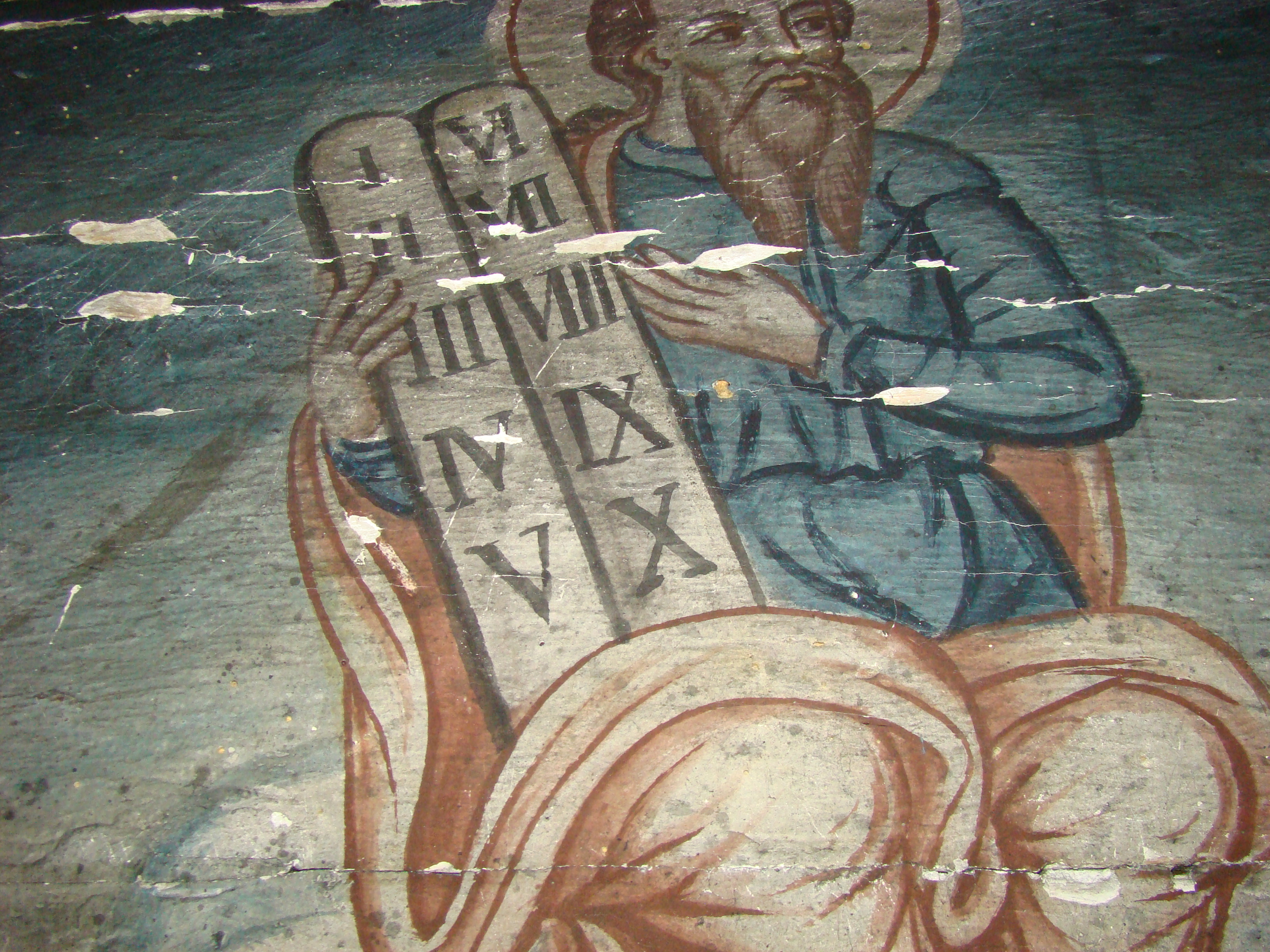 Biserica de lemn „Cuvioasa Paraschiva” Stâncești